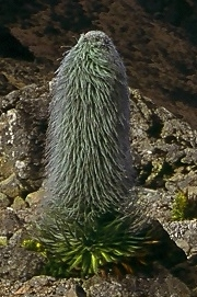 Lobelia telekii on Mount Kenya